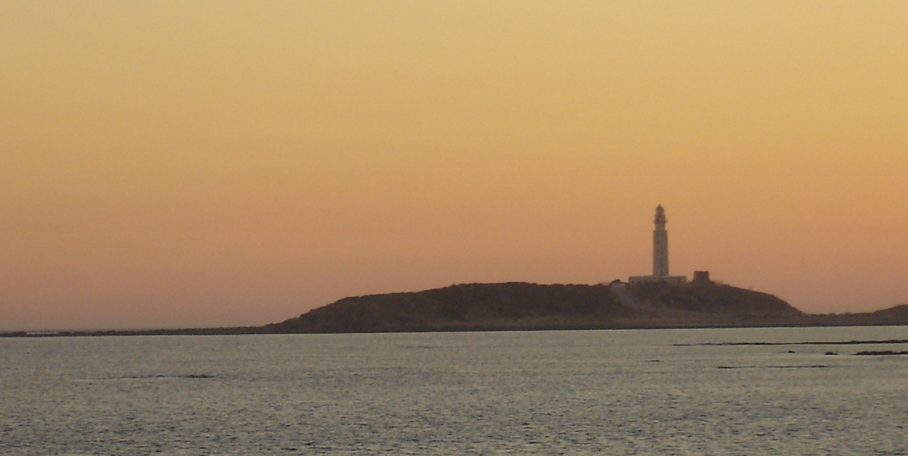 Cabo Trafalgar Cabo Trafalgar (Cabo Trafalgar) in Cádiz (Spain). Taken by JMSE and released into the public domain.